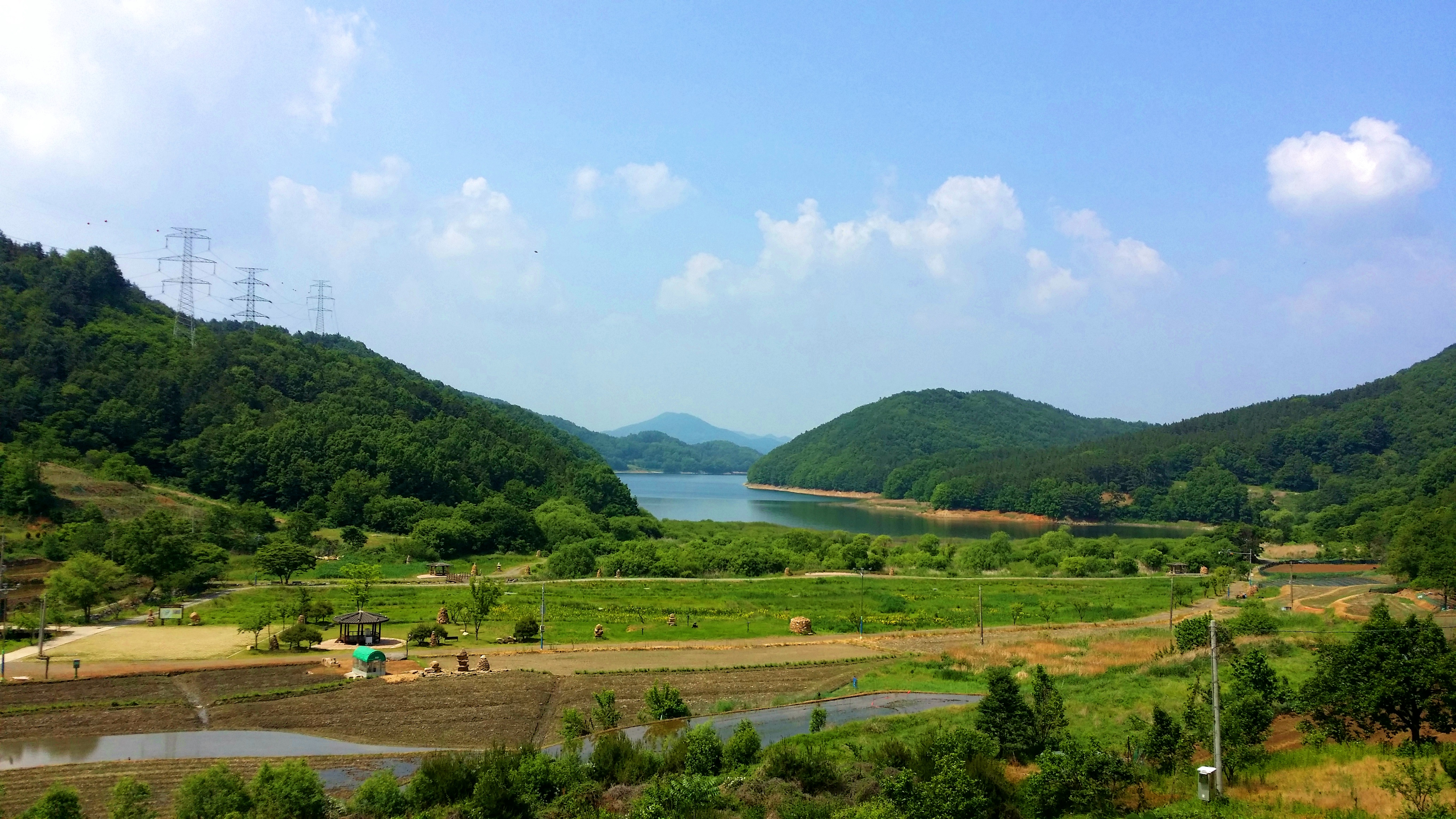 대청호오백리길 1구간_3